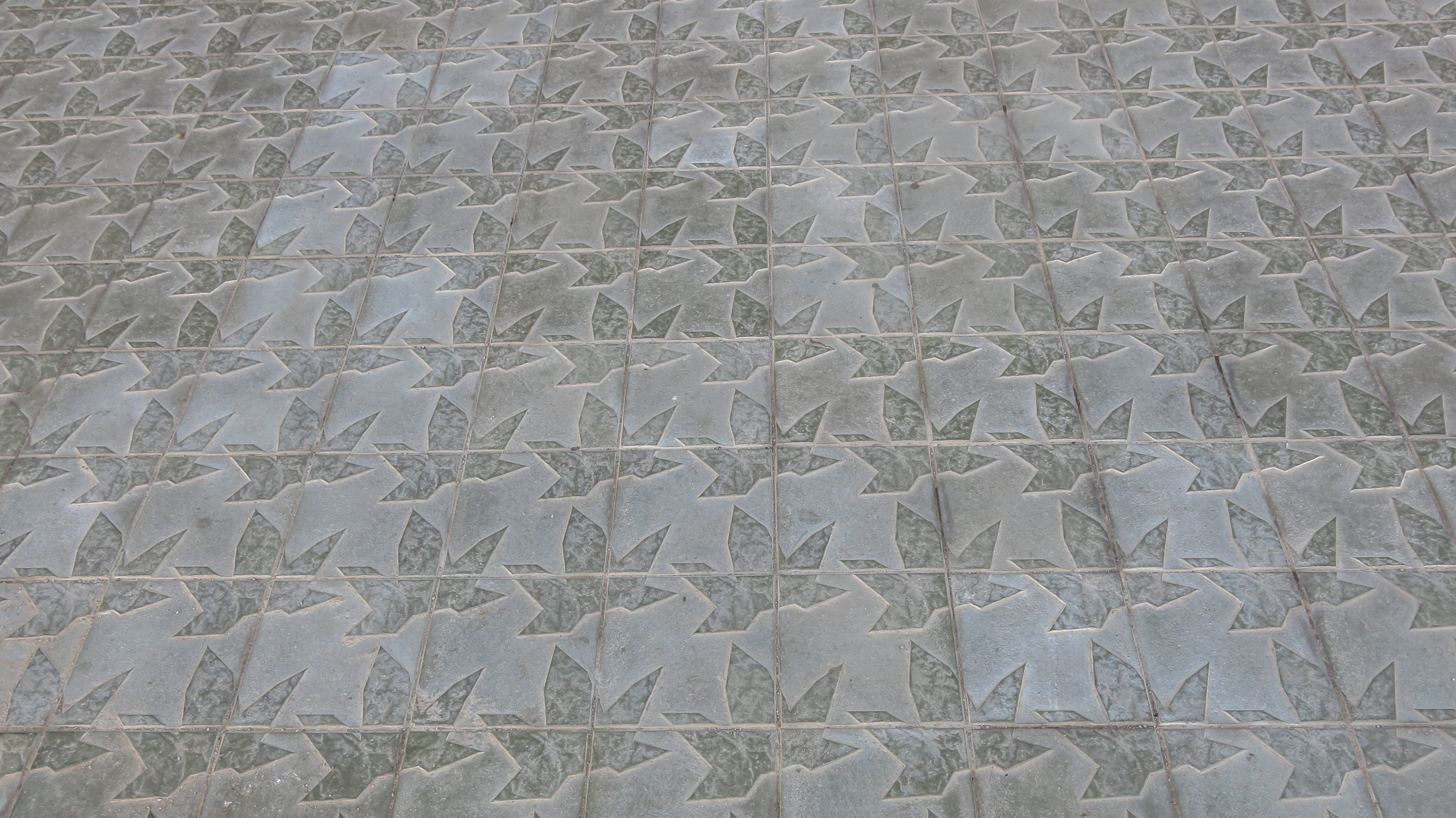 Avinguda Diagonal, rajoles noves, 2014